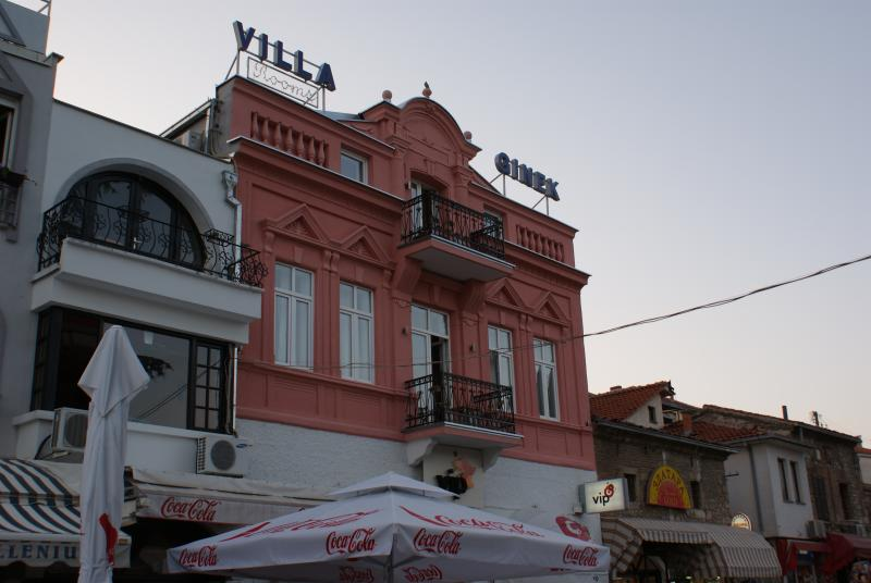 Ohrid, Macedonia